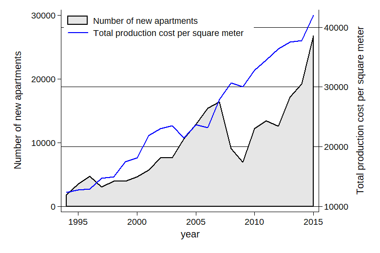 Byggkostnader (netto) per kvadratmeters boendeyta, för både byggkostnader och markkostnader. Dessutom antalet nybyggda lägenheter per år.